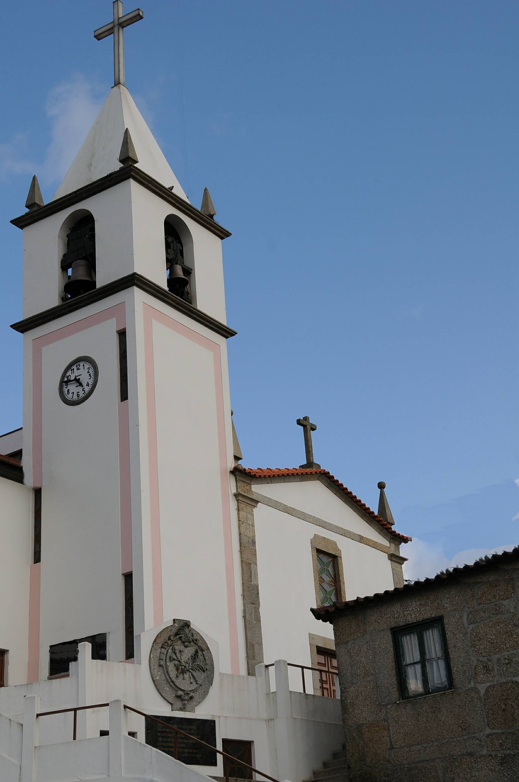 Morreira Church, in Braga, Portugal